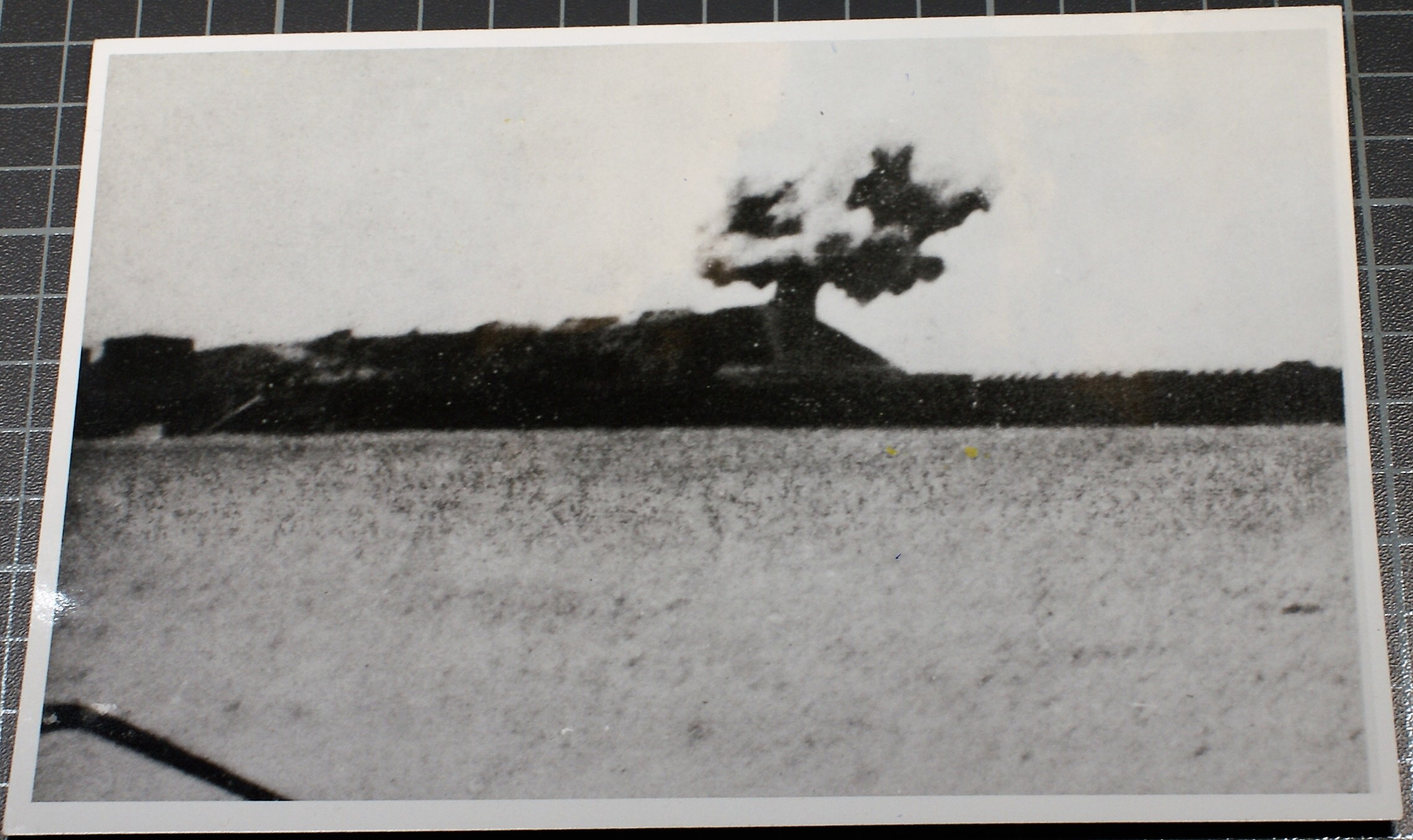 référence : 29Fi282